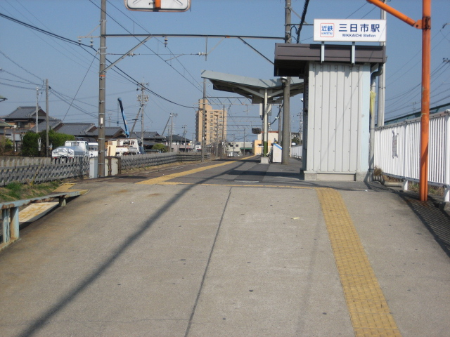 三日市駅